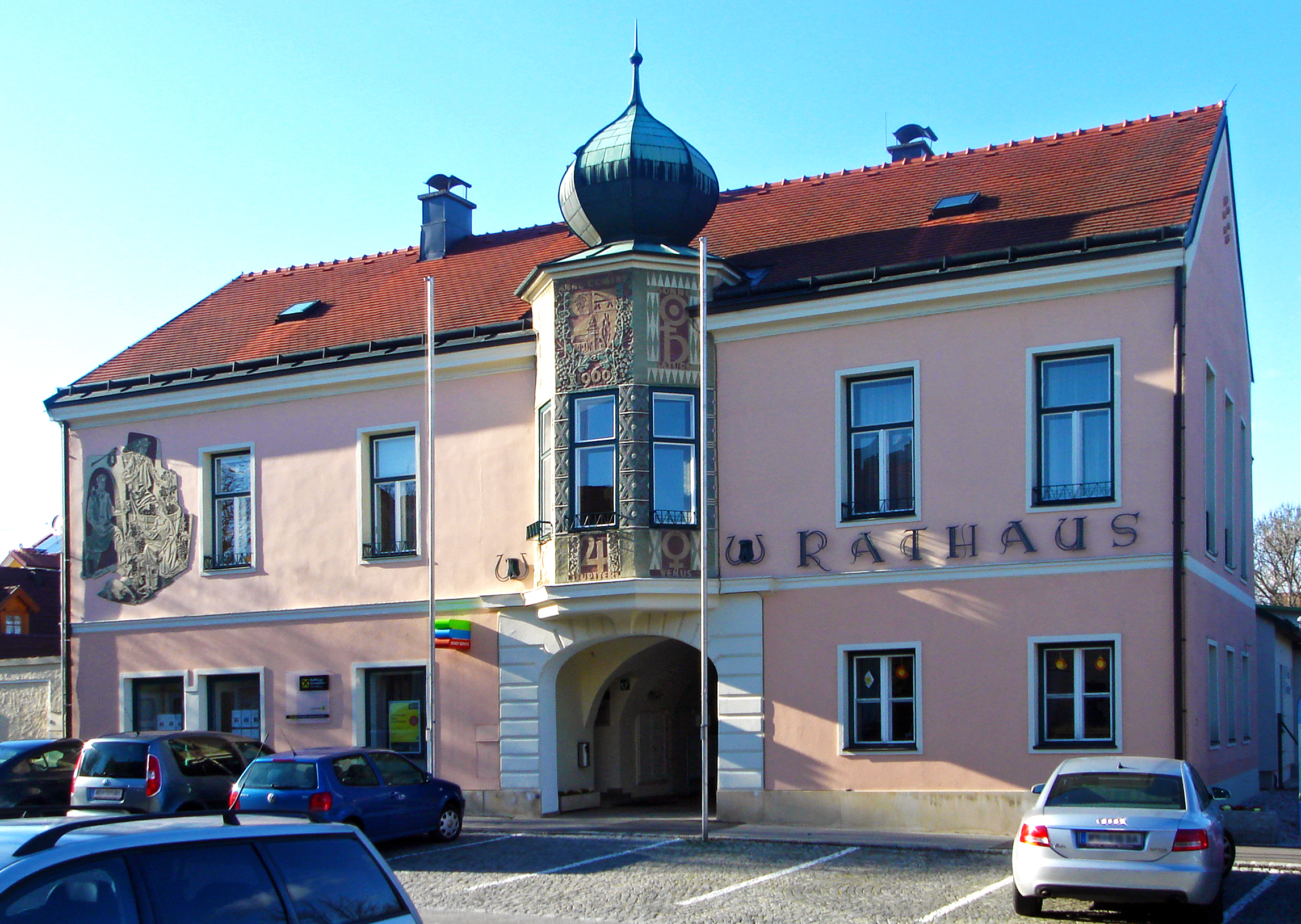 Sooß, Niederösterreich, Marktgemeindeamt (Rathaus), Hauptstraße 48; Wohn- und Sterbehaus von Oskar Lenz (1848–1925)